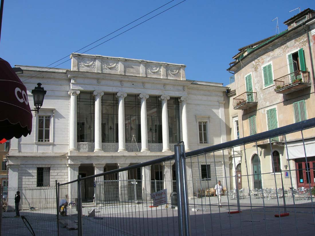 Teatro degli Animosi, Carrara. Immagine di mia proprietà e rilasciata con licenza GFDL.